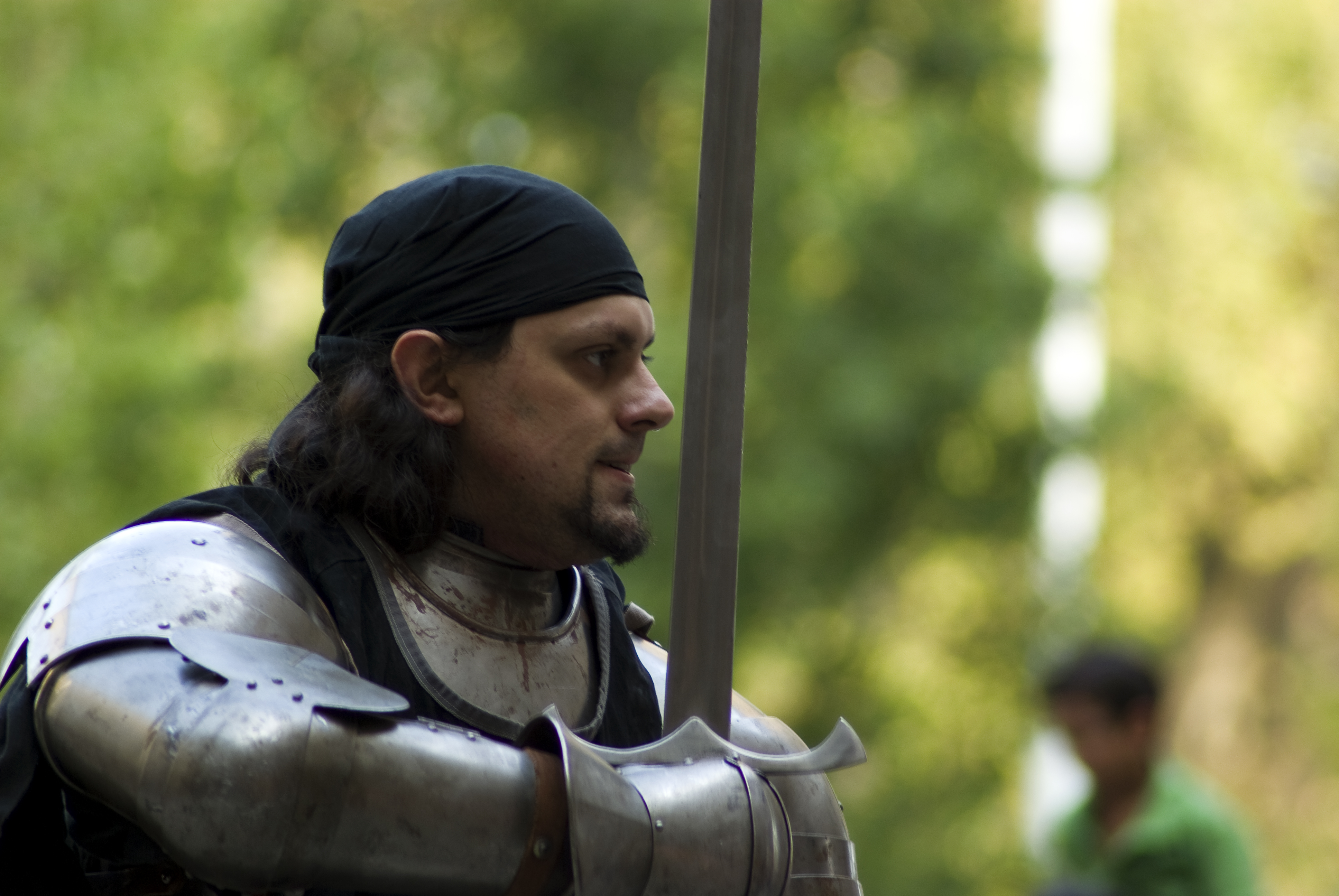 Combattimento con spada al Palio di Parma